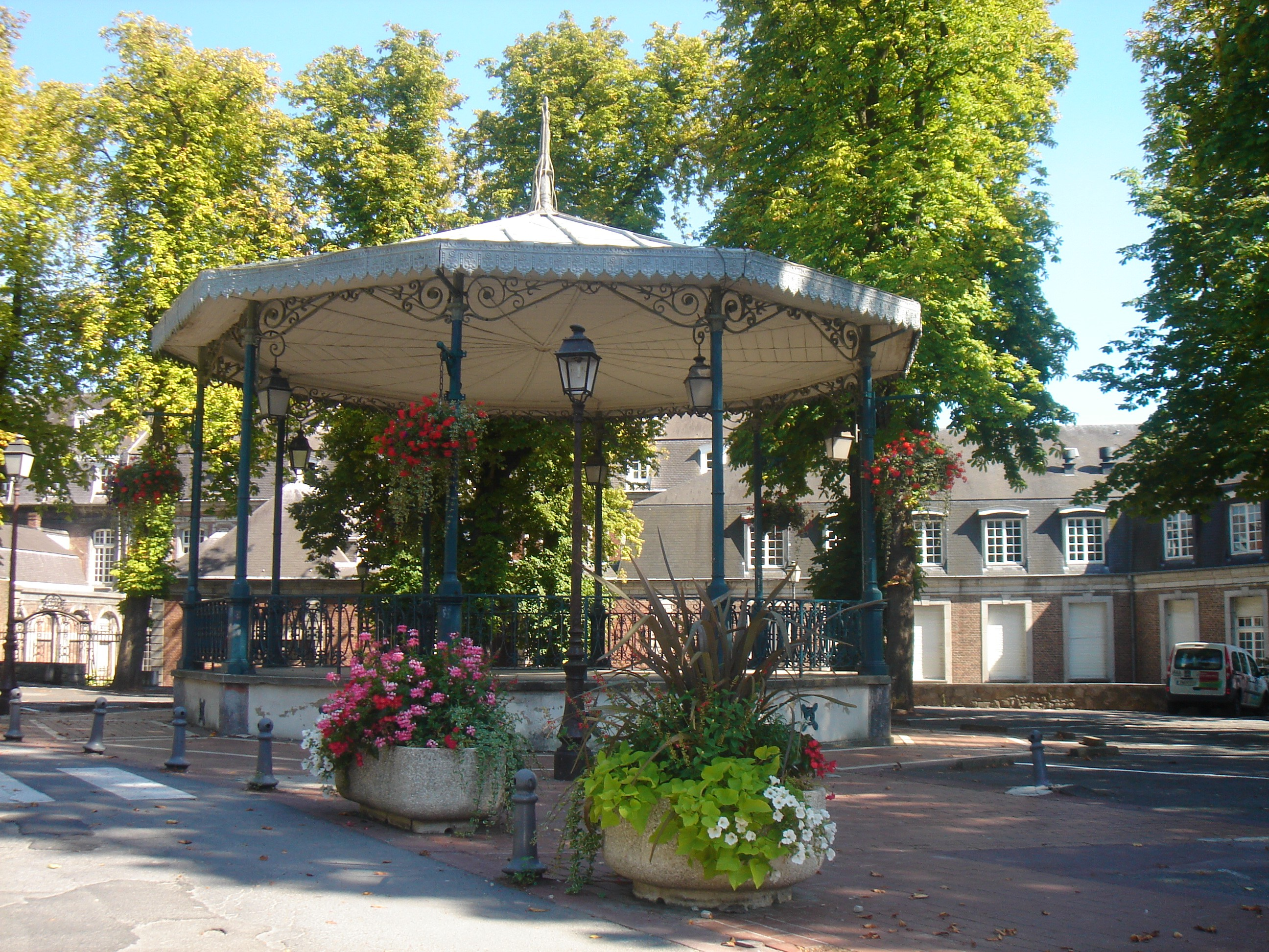 Place verte Maubeuge - France